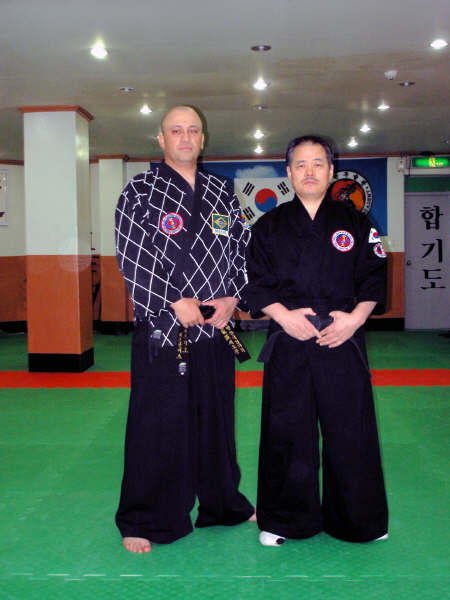 Sérgio e Ko